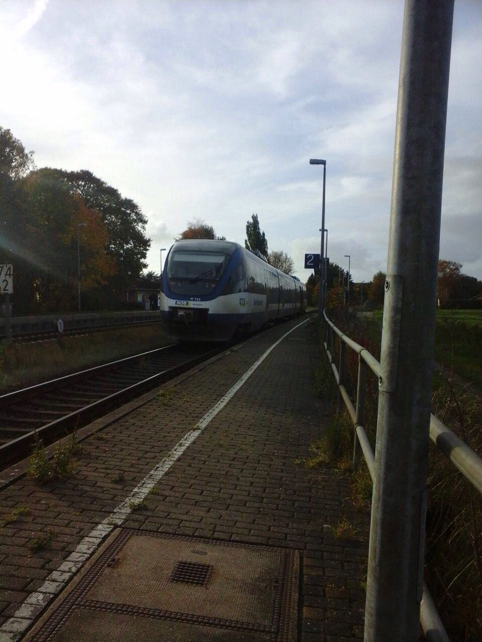 Eine Talent (NOB) auf Gleis 2.